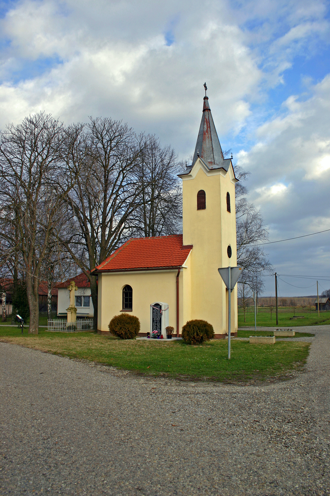 Kapela, Žitkovci. Chapel, Žitkovci. Kapelle, Žitkovci.